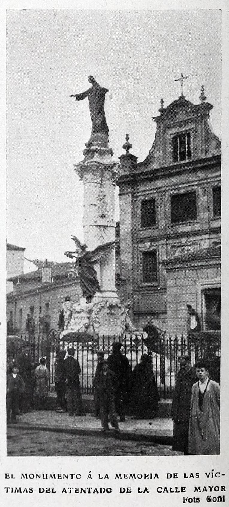 Monumento a las víctimas del atentado contra Alfonso XIII.